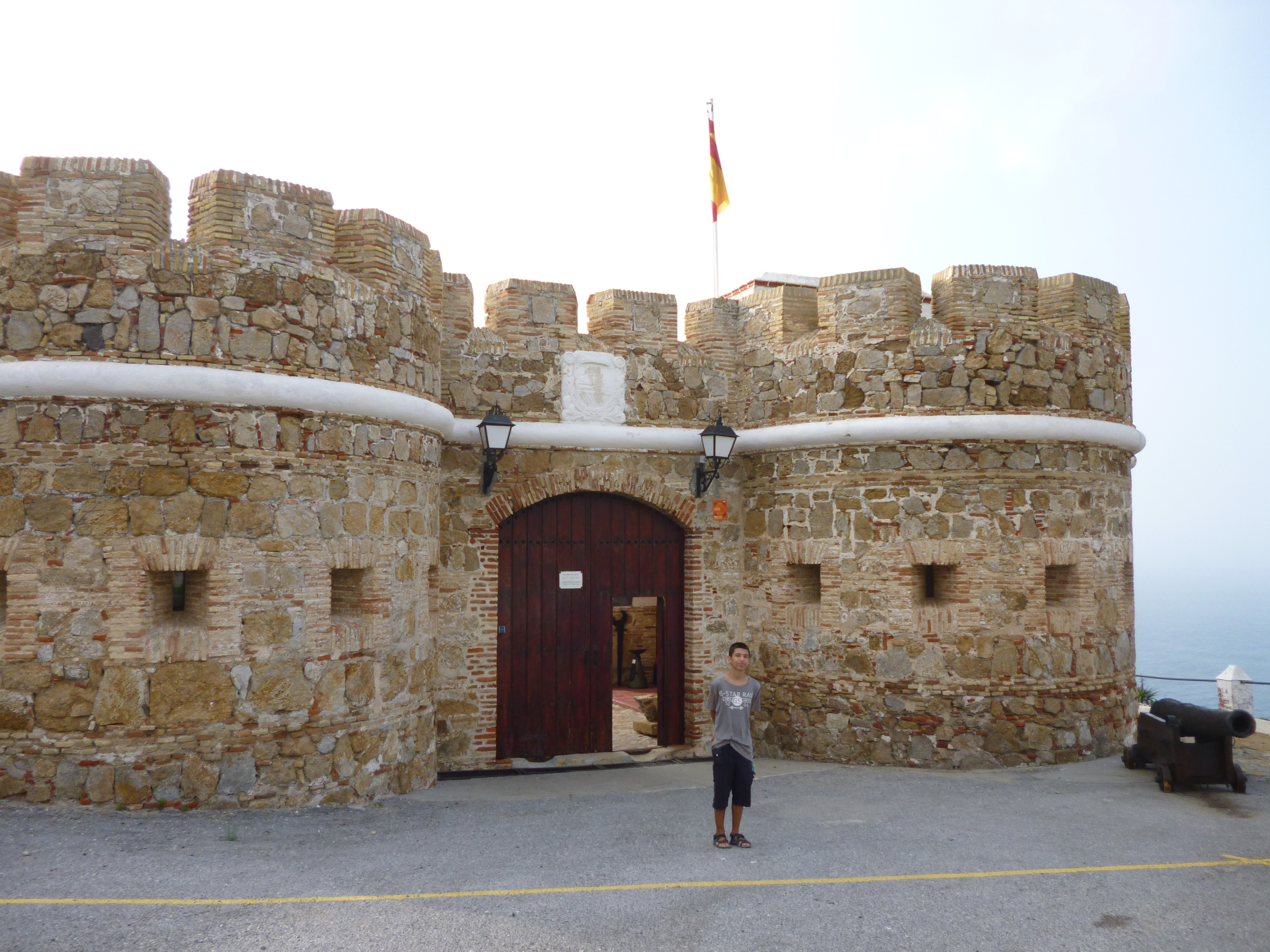 Fort of El Desnarigado